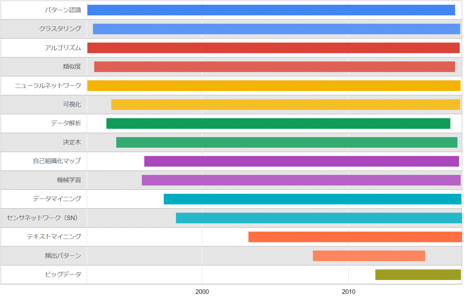 データマイニングの共起語を基準とした技術年表